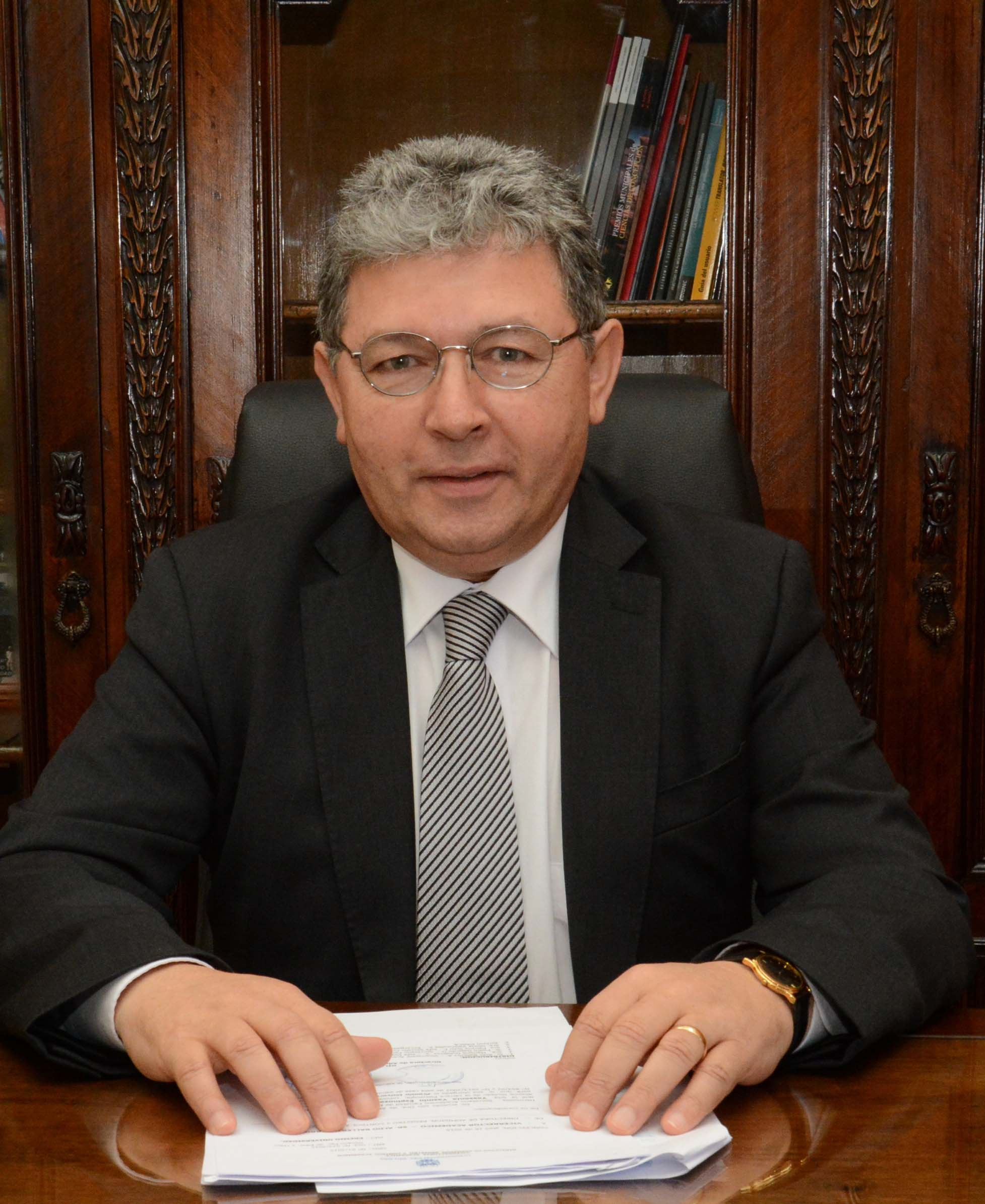 Rector Héctor Gaete Feres, Universidad del Bío-Bío